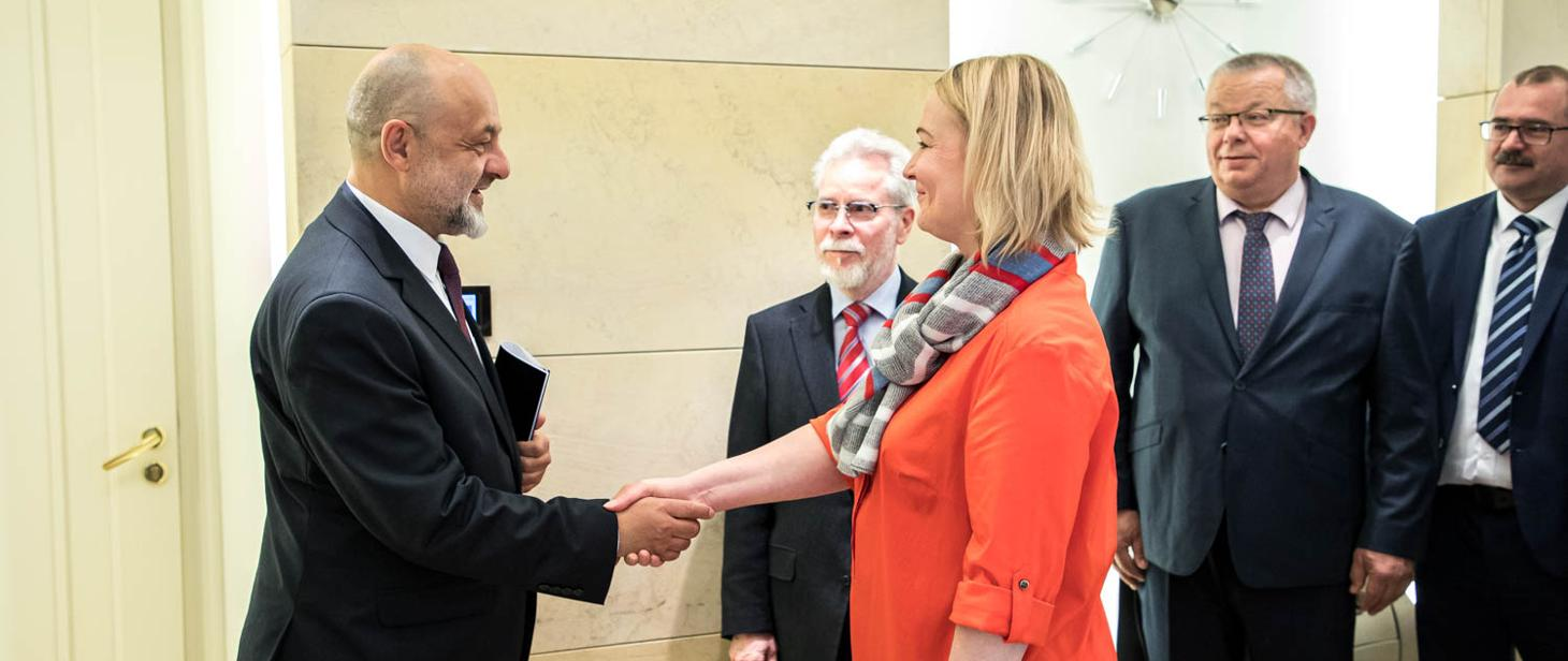 Wiceminister Maciej Lang przyjmuje w MSZ delegację Komisji ds. Obrony i Bezpieczeństwa Izby Poselskiej Parlamentu Republiki Czeskiej